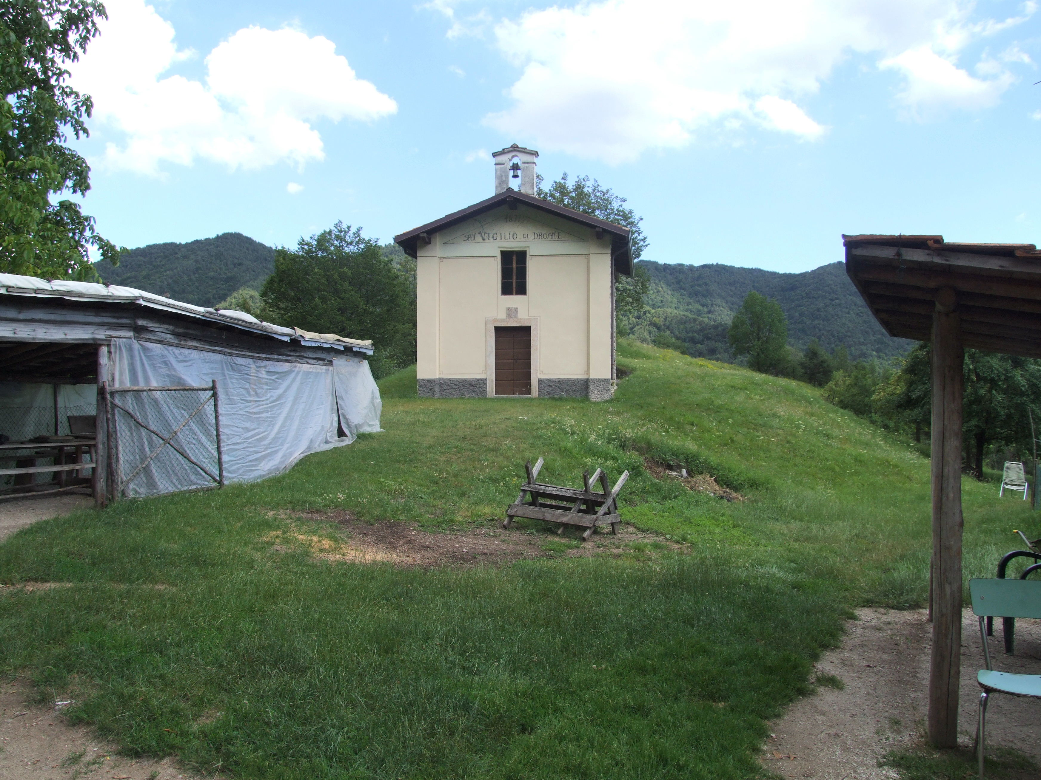 Droane di valvestino, chiesa di san Vigilio.